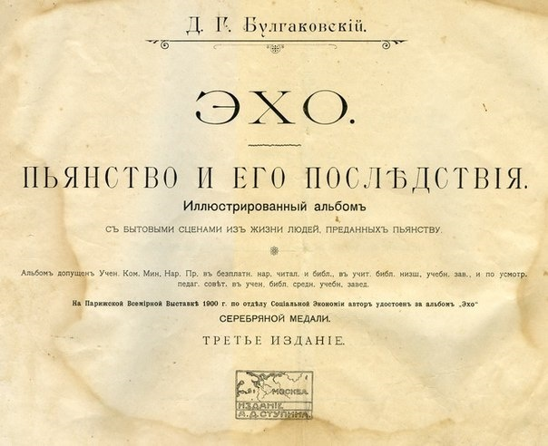 Скан титульного листа иллюстрированного альбома, изданного до 1917 года. Автор - Булгаковский Д. Г.